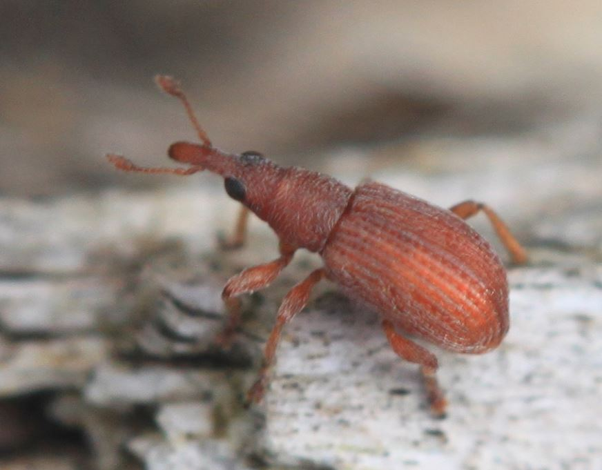 Apion cf. rubiginosum am 24. März 2017 nahe Hockenheimring